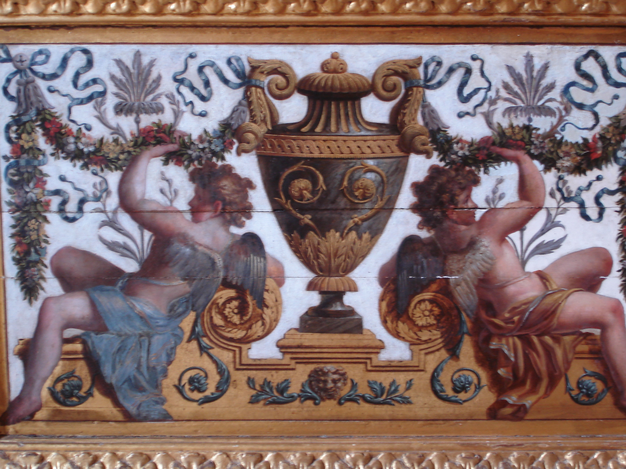 Faience painting in the "Salle du Livre d'Or" in Palais du Luxembourg (Paris V)